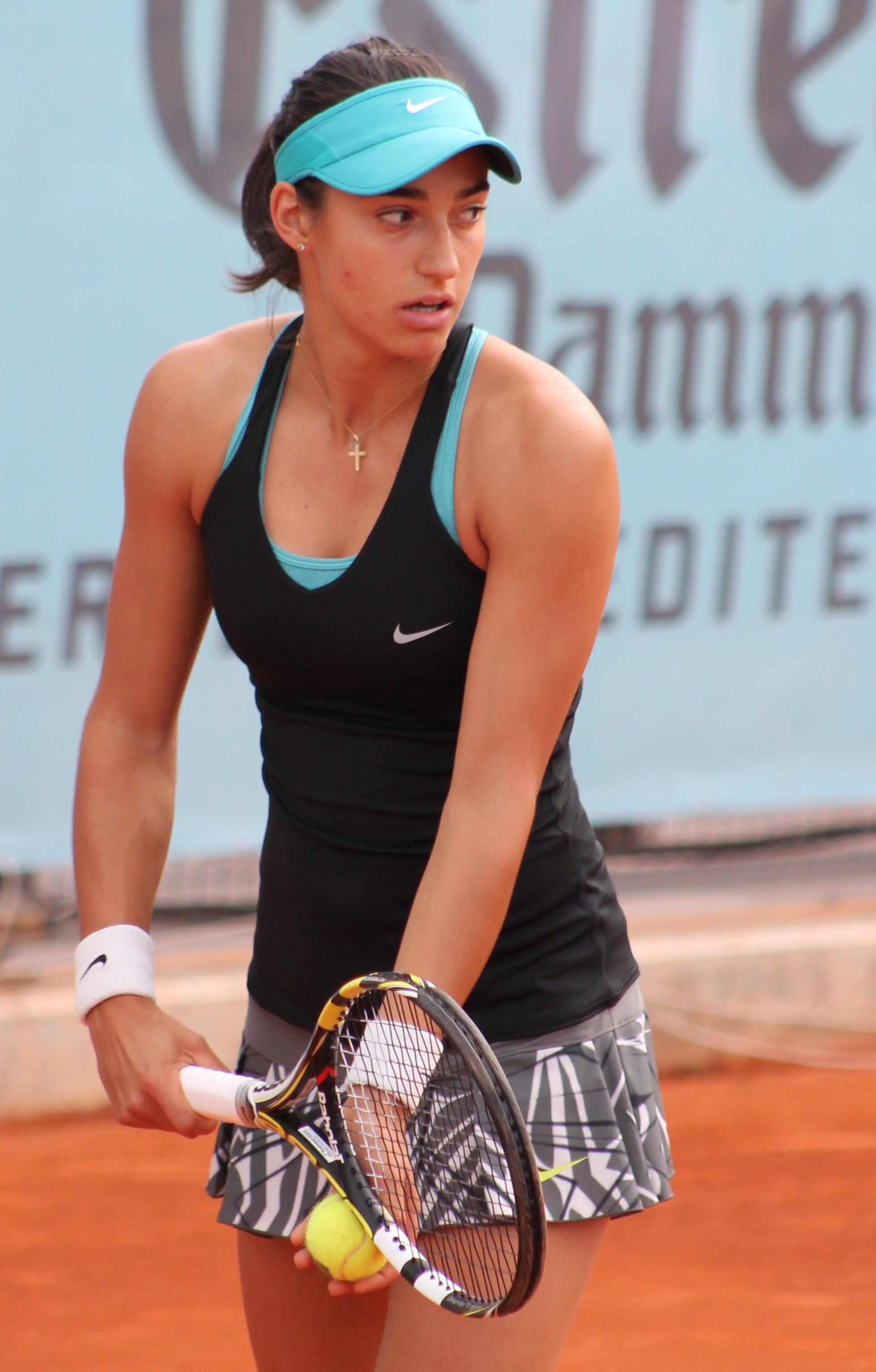 Garcia MA14 - Copy (2)